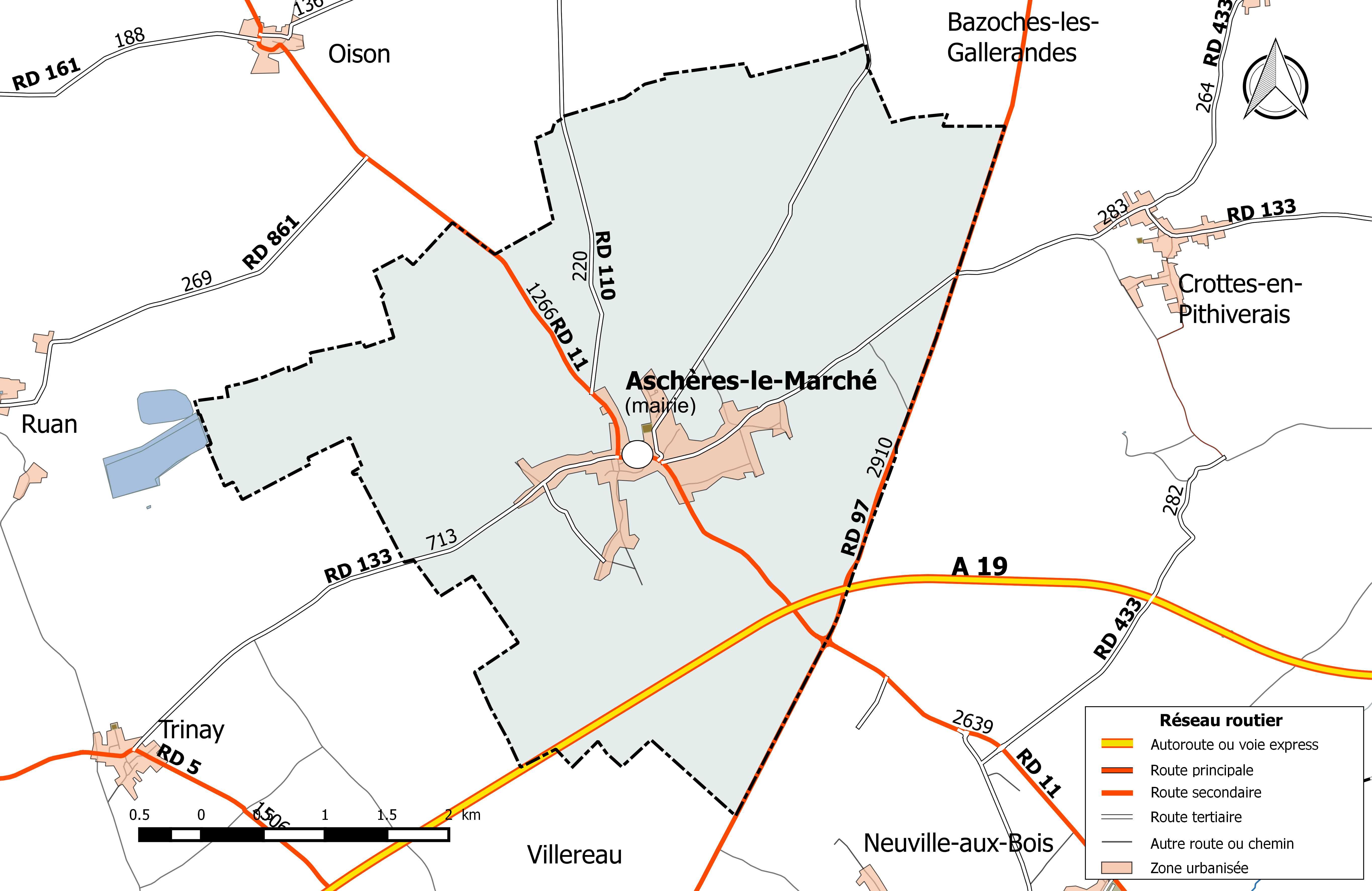 Carte du réseau routier de la commune de Aschères-le-Marché.